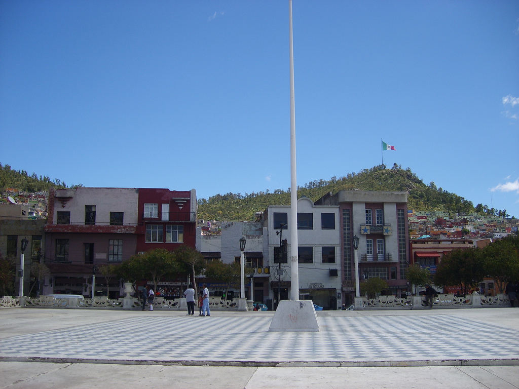 Plaza Independencia en Pachuca de Soto, Hidalgo, México